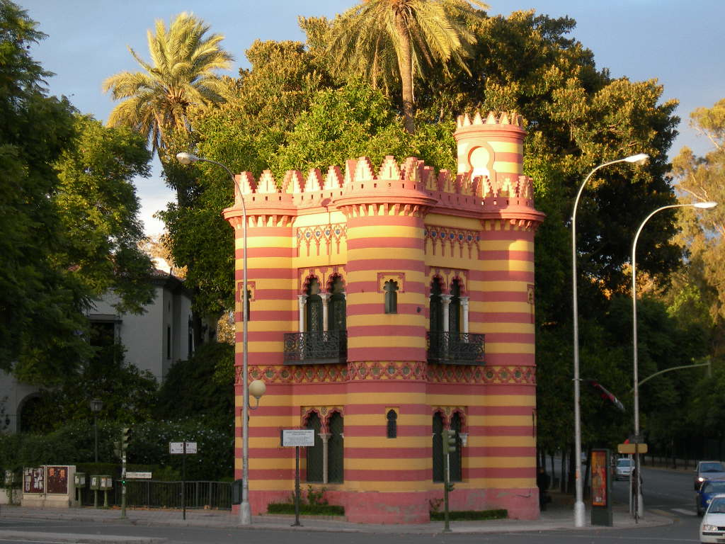 Sevilla. El "Costurero de la Reina" en un atardecer otoñal. Año 2006. Foto realizada y propiedad de Miguel Ángel Sevilla. He de destacar al respecto de esta imagen (por si existiese alguna duda) que se ha utilizado para la publicación "Guía práctica Feria de Abril 2008" realizada por el Ayuntamiento de Sevilla para las fiestas de ese año sin indicio de indicación de fuentes.